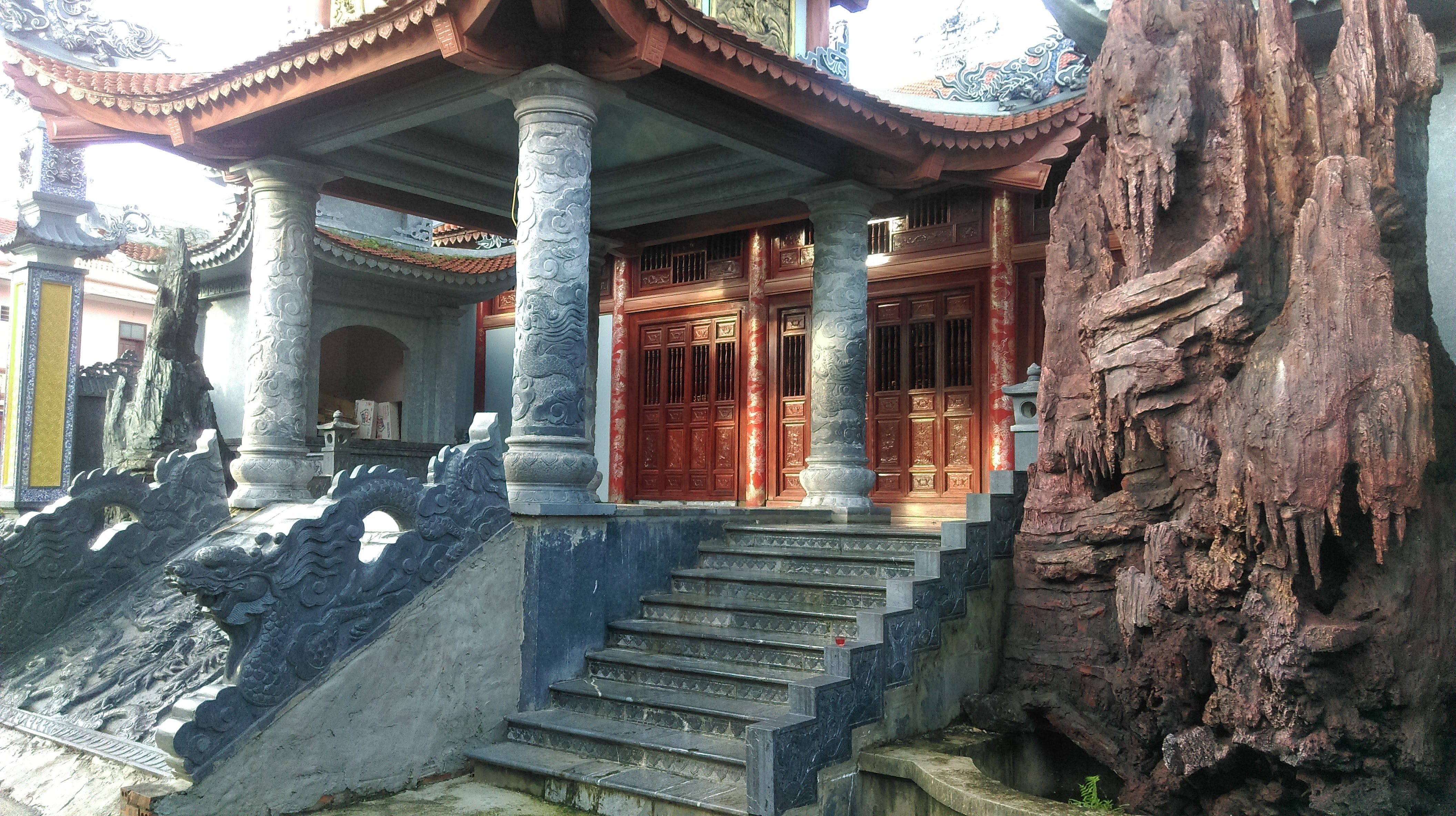 Đền Cửu Tỉnh, Phù Vân, Phủ Lý, Hà Nam